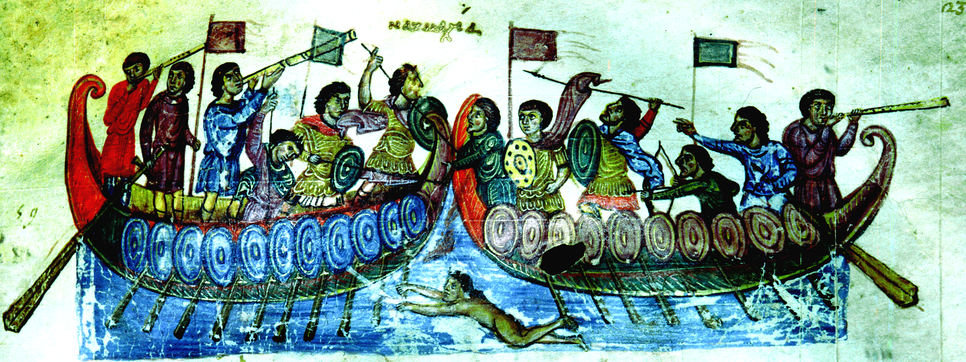 Byzantinische Miniaturmalerei 13. Jh aus Oppians Cynegetica: "Naumachia", "Seeschlacht", mit der Wiedergabe eines Kampfschwimmers, Paris, Bibliotheque Nationale